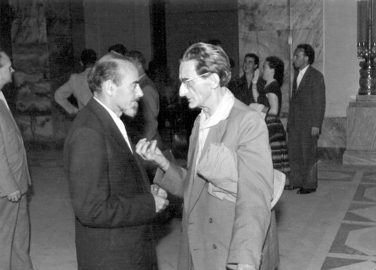 Interparolo de Tibor Sekelj kaj Julio Baghy dum Universala Kongreso 1959 en Varsovio, Pollando.